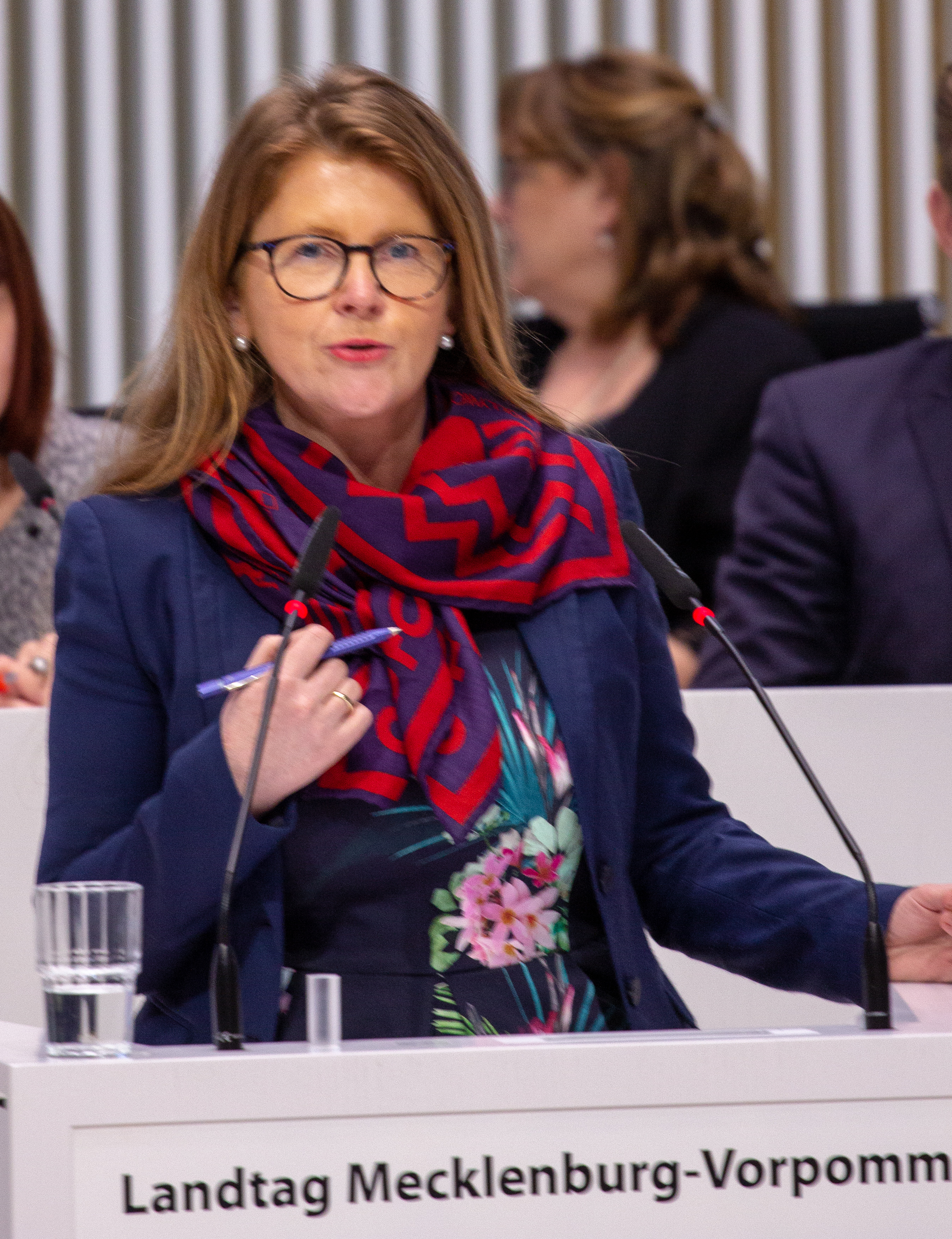 Katy Hoffmeister im Rahmen der Plenarsitzung des Landtages Mecklenburg-Vorpommern am 13. März 2019 in Schwerin.